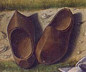 Natividad, Aigueperse